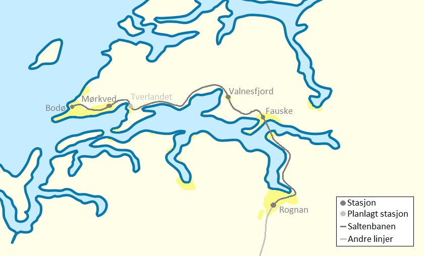 Linjekart over lokaltogene i Salten, som går strekningen Bodø - Fauske - Rognan. Kartet er opprinnelig hentet fra (CC-BY-SA)